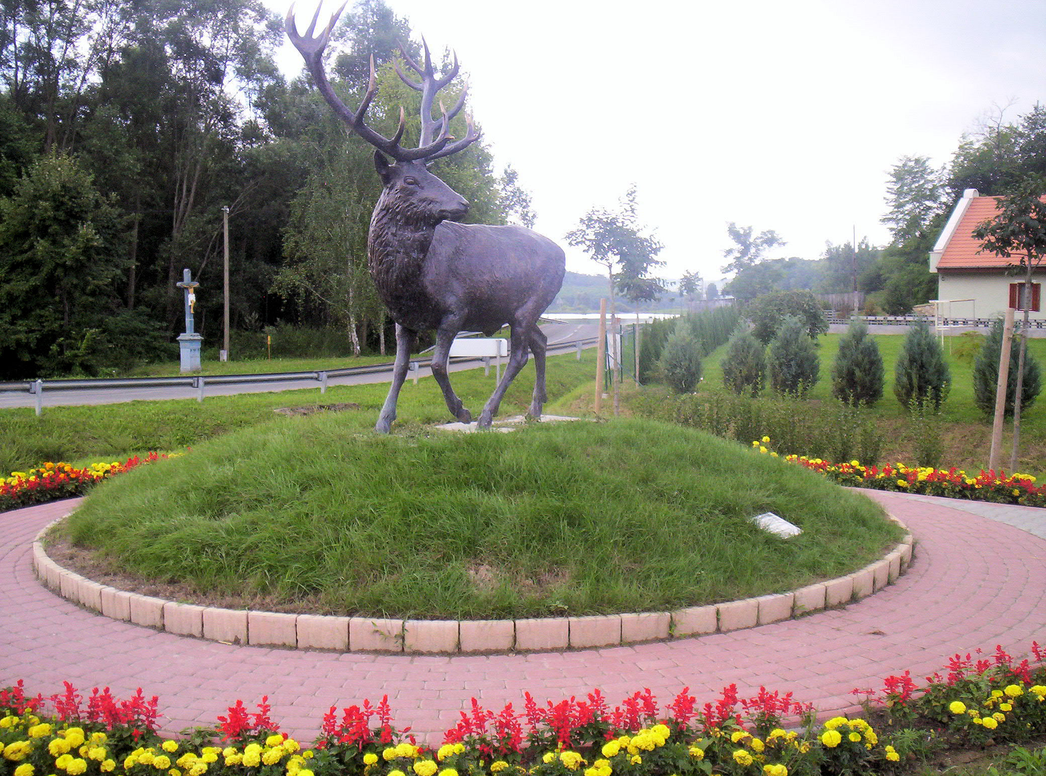 1891-ben ejtette el Reinspach János. 243.90 pontos trófeája 60 éven keresztül világelső volt. Farkas Pál (2005) alkotása. – photo taken by uploader User:Csanády in 2006.